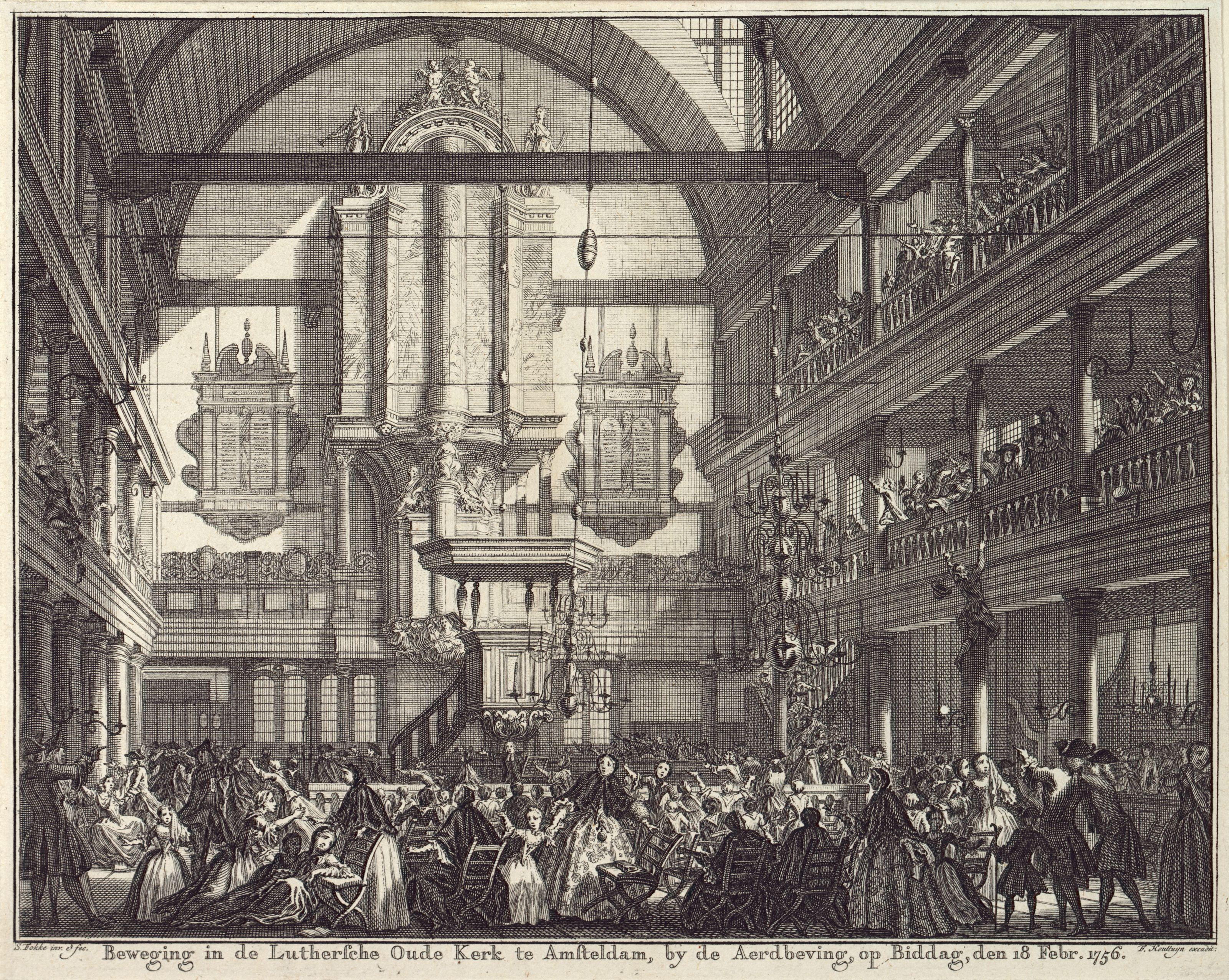 Beschrijving Beweging in de Luthersche Oude Kerk te Amsterdam, by de Aerdbeving, op Biddag, den 18 Febr. 1756 Het interieur van de Oude Lutherse Kerk aan het Spui, gezien naar preekstoel en orgel, tijdens de aardbeving van 1756. Afmetingen: 170 x 230 mm Documenttype prent Vervaardiger Fokke, Simon (1712-1784) Houttuyn, F. Collectie Collectie Atlas Dreesmann Datering 1756 Geografische naam Singel Gebouw Oude Lutherse Kerk Inventarissen Afbeeldingsbestand 010094000018